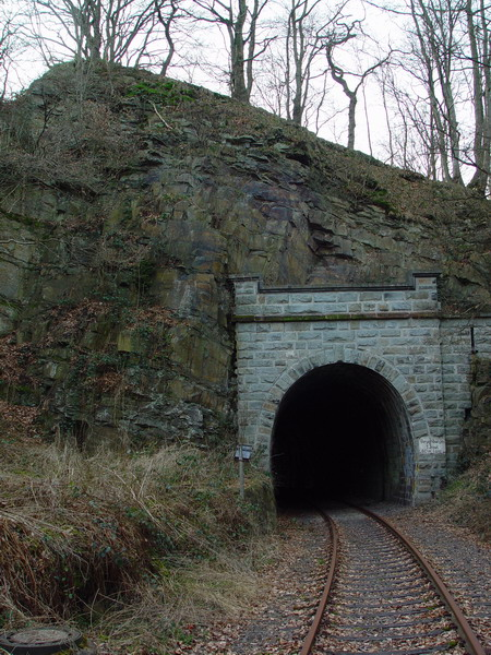 Ostportal des Beyenburger Tunnels in Wuppertal